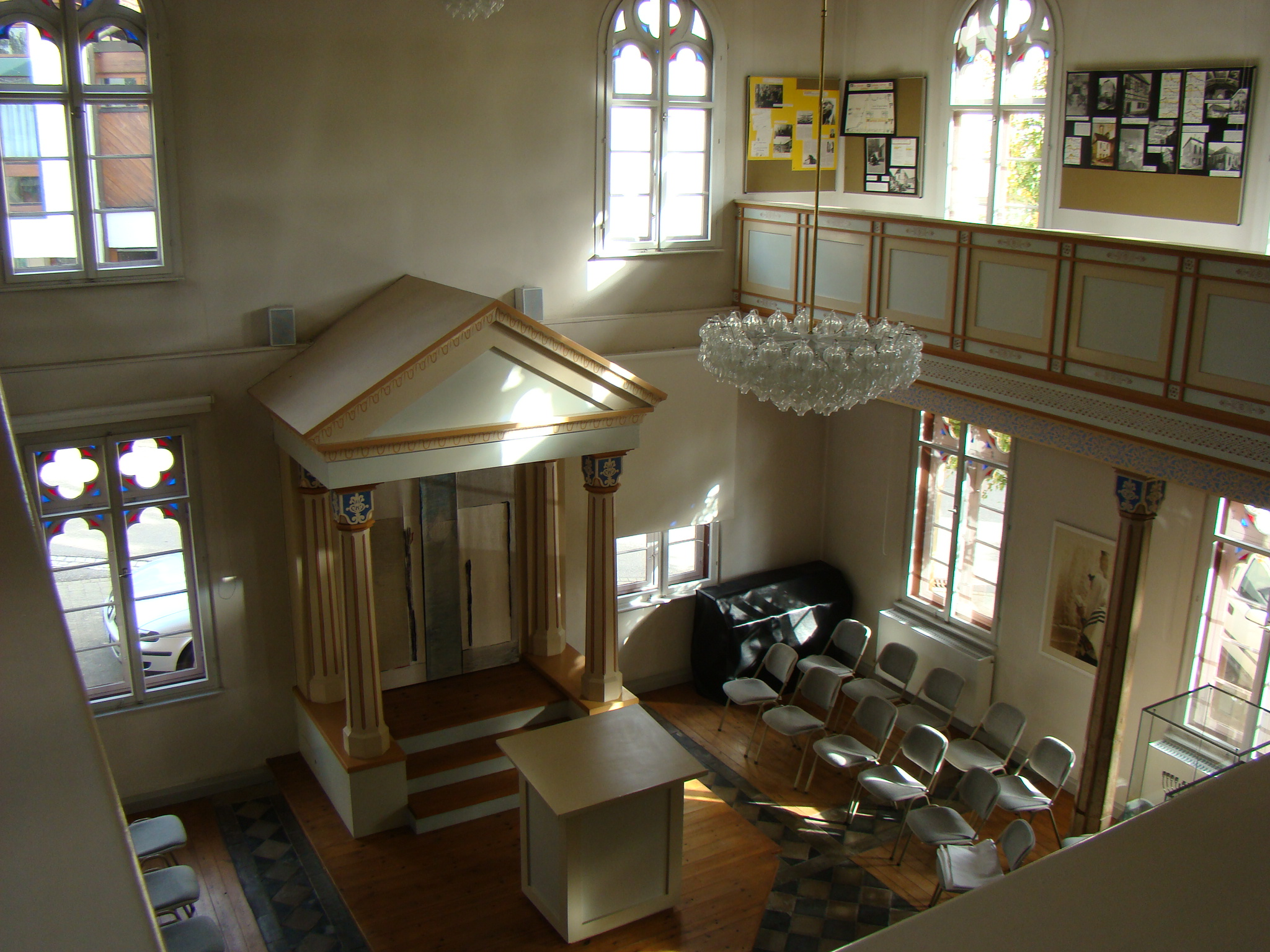 Blick in die ehem. Synagoge in Obersulm-Affaltrach